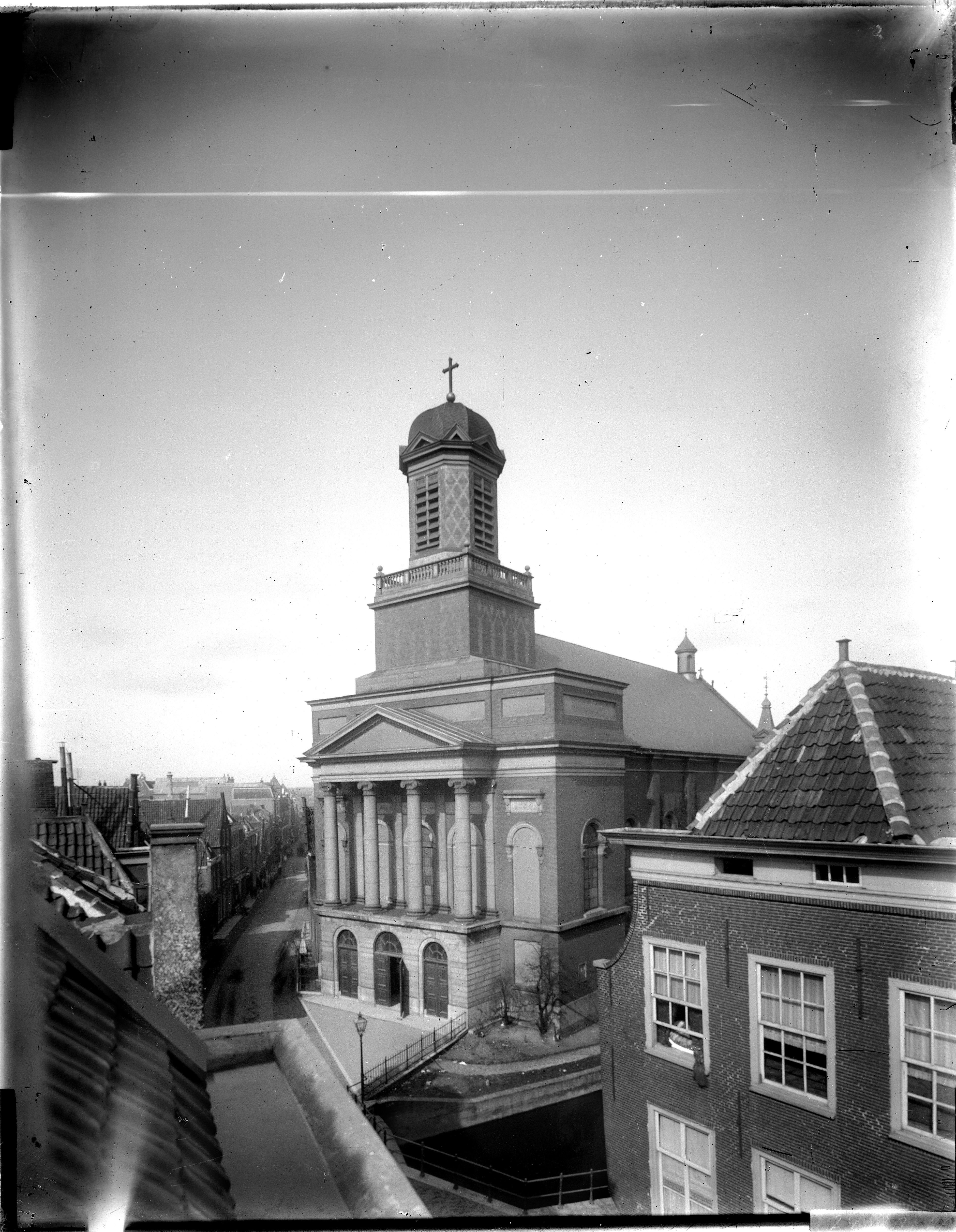 Gezicht op de Hartebrugkerk, Haarlemmerstraat 110. OLV Onbevlekte Ontvangenis gezien vanuit de zolderverdieping van een huis aan de Haarlemmerstraat naar het noordwesten.